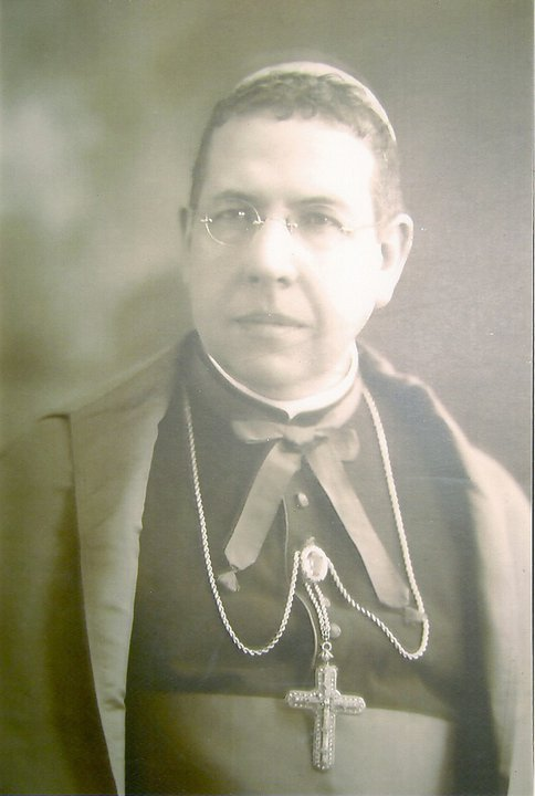 Forografía del Obispo de Salta, y Obispo "in partibus infidelum" de Sophene, Julio Campero y Aráoz (1874-1938).